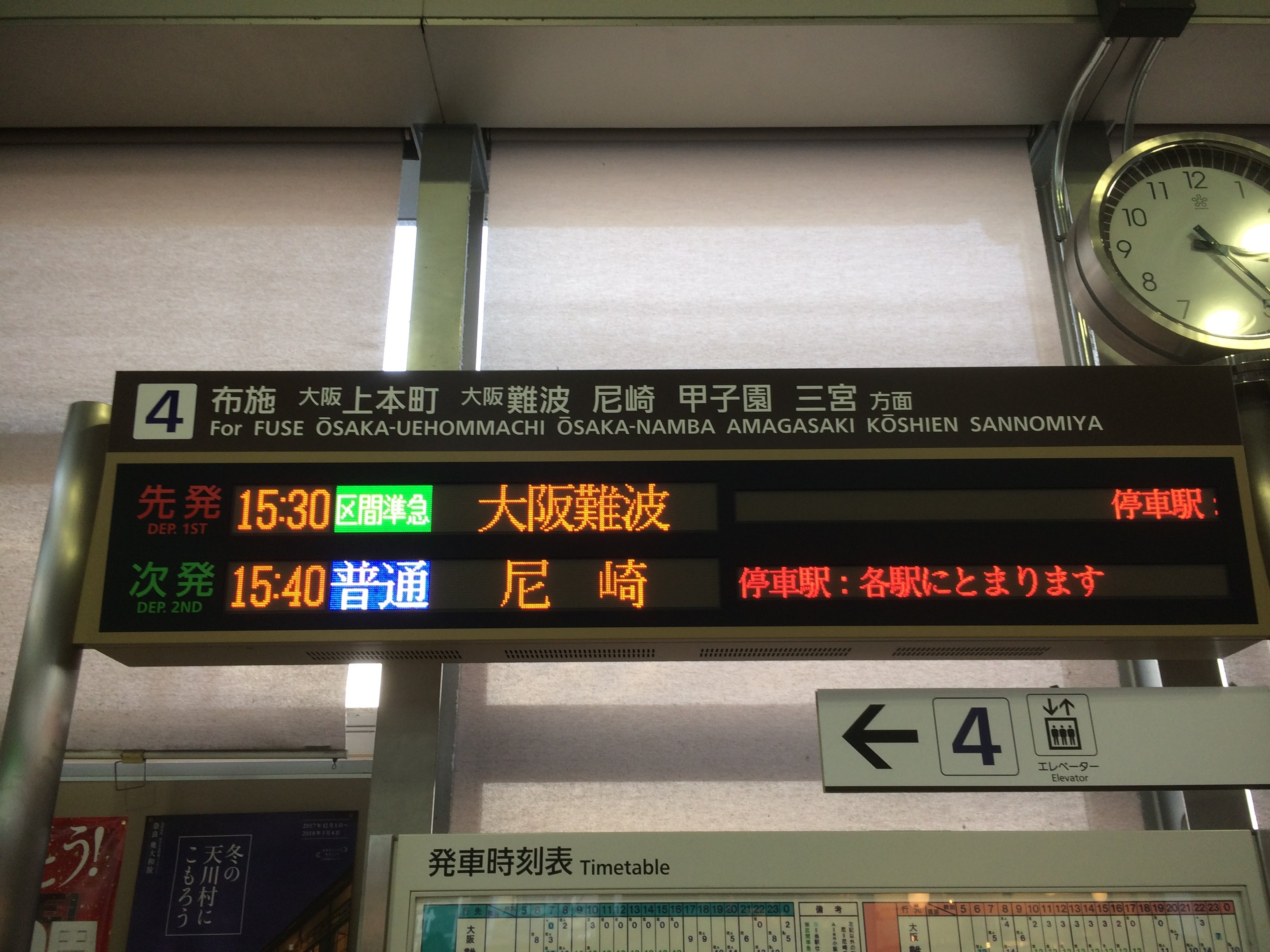 瓢箪山駅・発車票